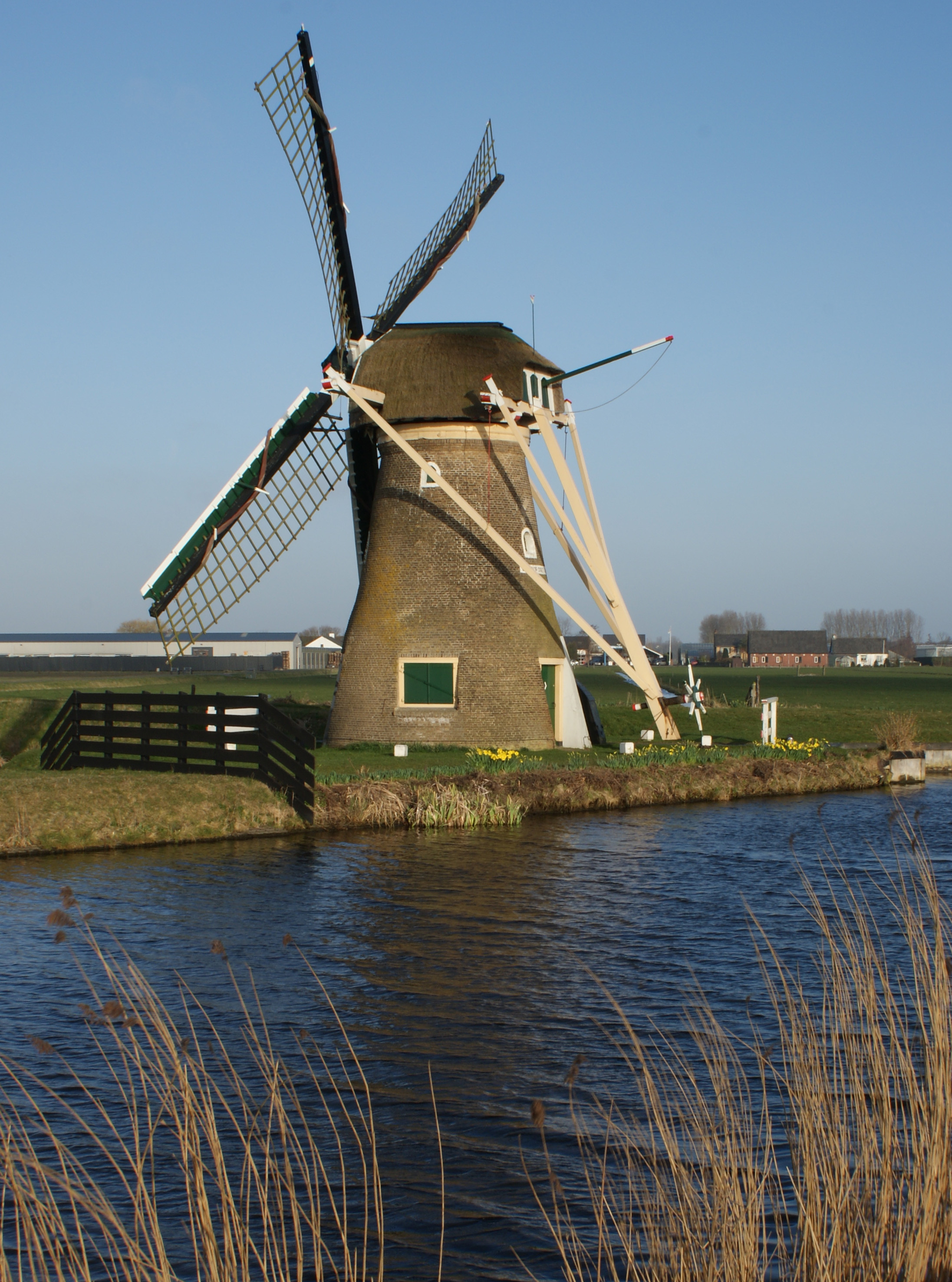 This windmill, named "If there's hope, there's life", was built in 1783 in Rijnsburg. Because of the expansion of the FloraHolland flower auction the mill had to be moved in 1999 to the Elsgeesterpolder near Voorhout. Gebouwd in 1783 in Rijnsburg, Door de uitbreiding van de bloemenveiling FloraHolland raakte de molen steeds meer ingesloten en werd daarom op kosten van de veiling in 1999 verplaatst naar de Elsgeesterpolder bij Voorhout.